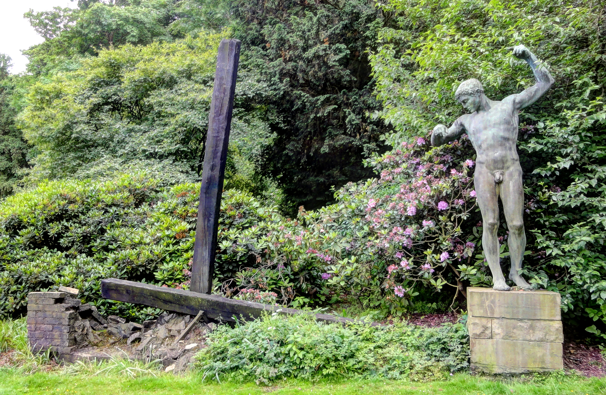 Denkmal für die am 4. Februar 1919 Gefallenen der Division Gerstenberg und des Freikorps Caspari, Opfertod, Jüngling in Bremen, WallanlagenDas abgebildete Objekt ist ein geschütztes Kulturdenkmal in der Freien Hansestadt Bremen, mit der Nr. 1193,T011 beim Landesamt für Denkmalpflege registriert.